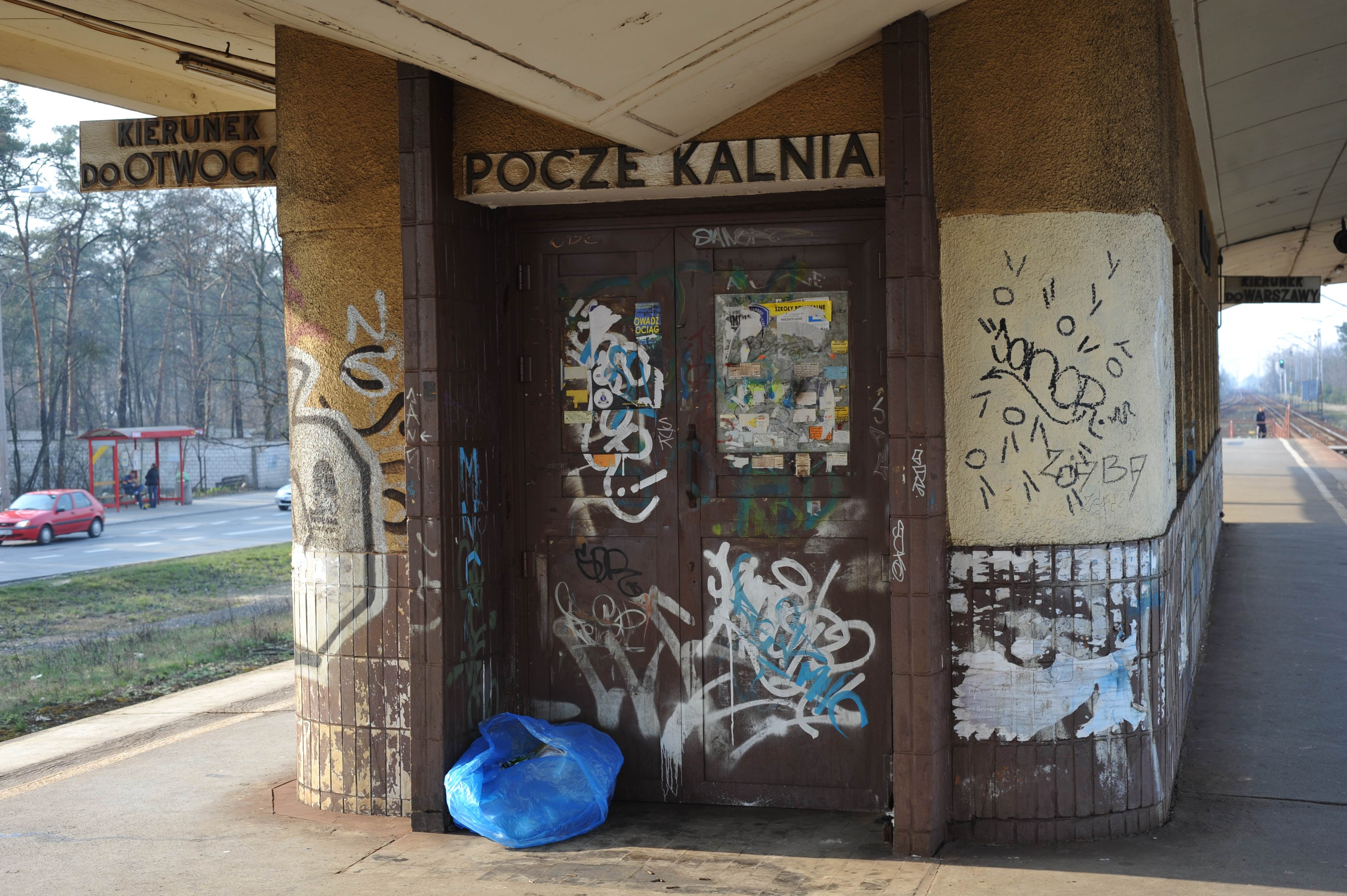 Wejście do byłej poczekalni na stacji Warszawa Radość